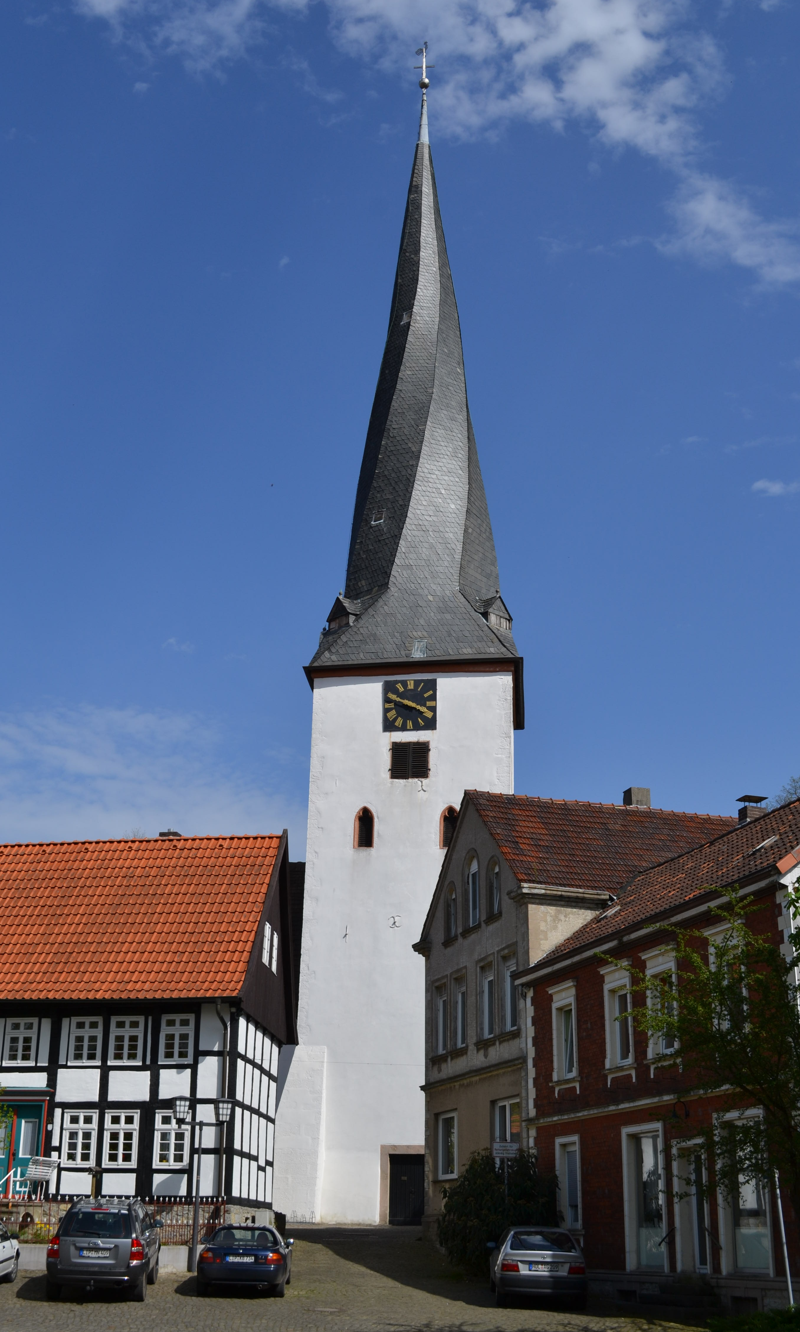 Baudenkmal Lage Nr. 7 - Kirche Heiden Kirchplatz 9